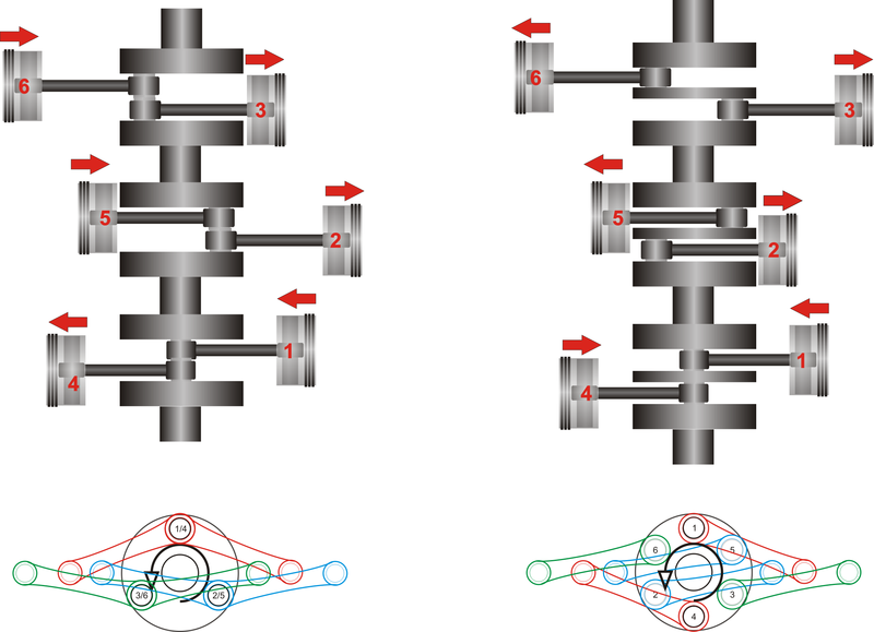 Différence entre deux moteurs à plat, en V à 180° à Gauche, Boxer à Droite